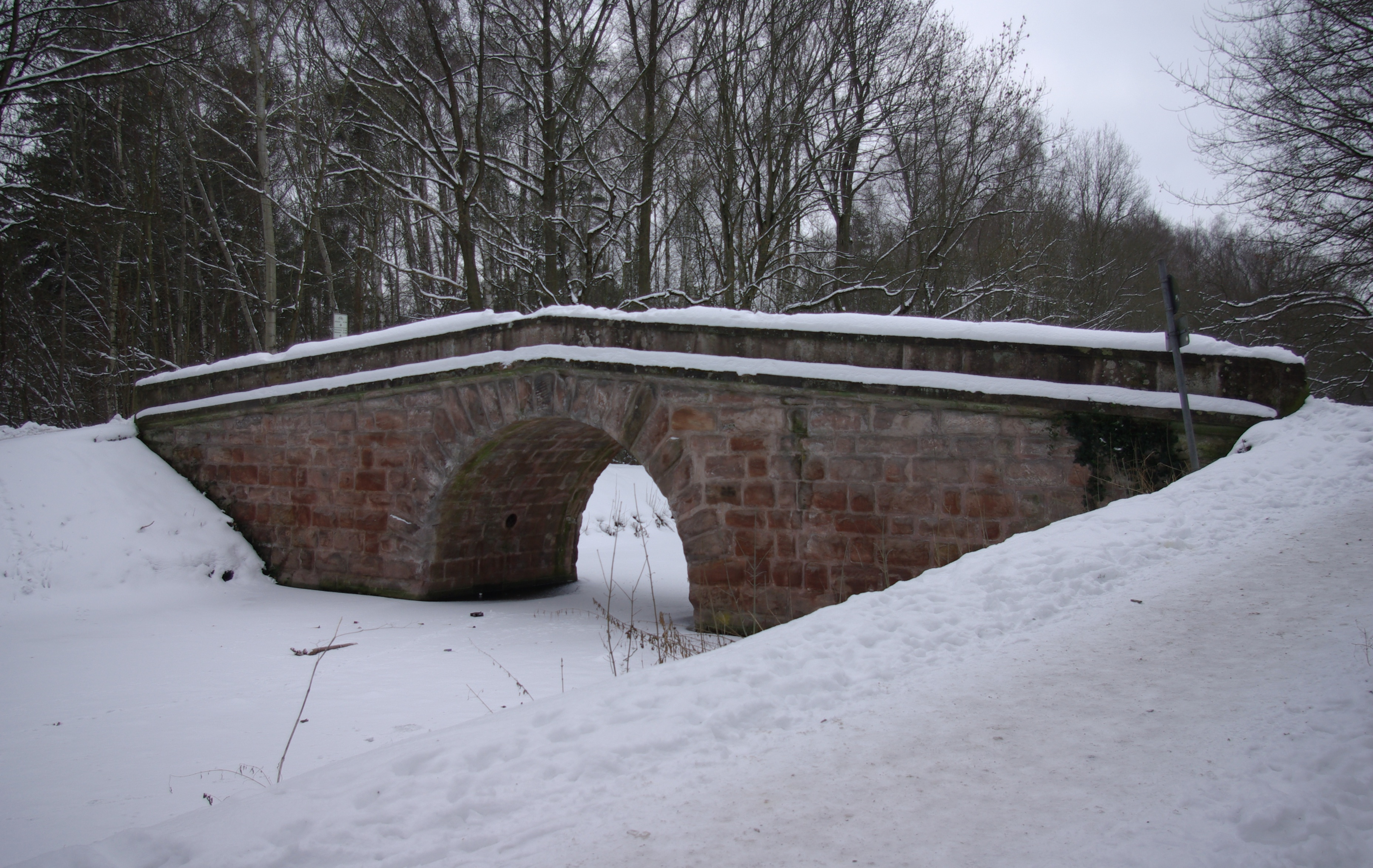 Rundbogenbrücke des Ludwig-Donau-Main-Kanals in Nürnberg-Gartenstadt. Nach dem Vorbild am Canal du Rhône au Rhin entstanden neun solcher Straßenbrücken ohne die darunter verlaufende Treidelpfade auskamen. Zwei davon sind noch erhalten: bei Schloss Gugelhammer und in Nürnberg-Gartenstadt. An allen Brücken verengte sich der Kanal auf 5,84 Meter Breite.